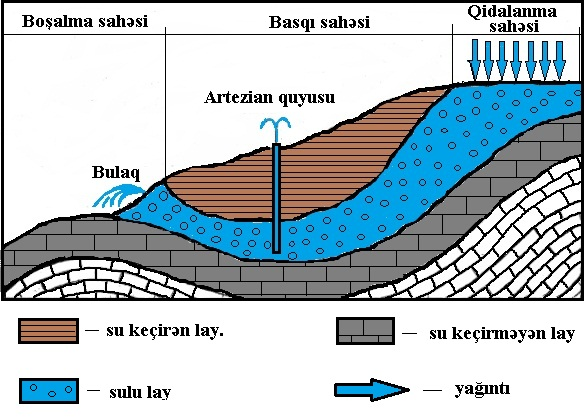 Artezian suyu